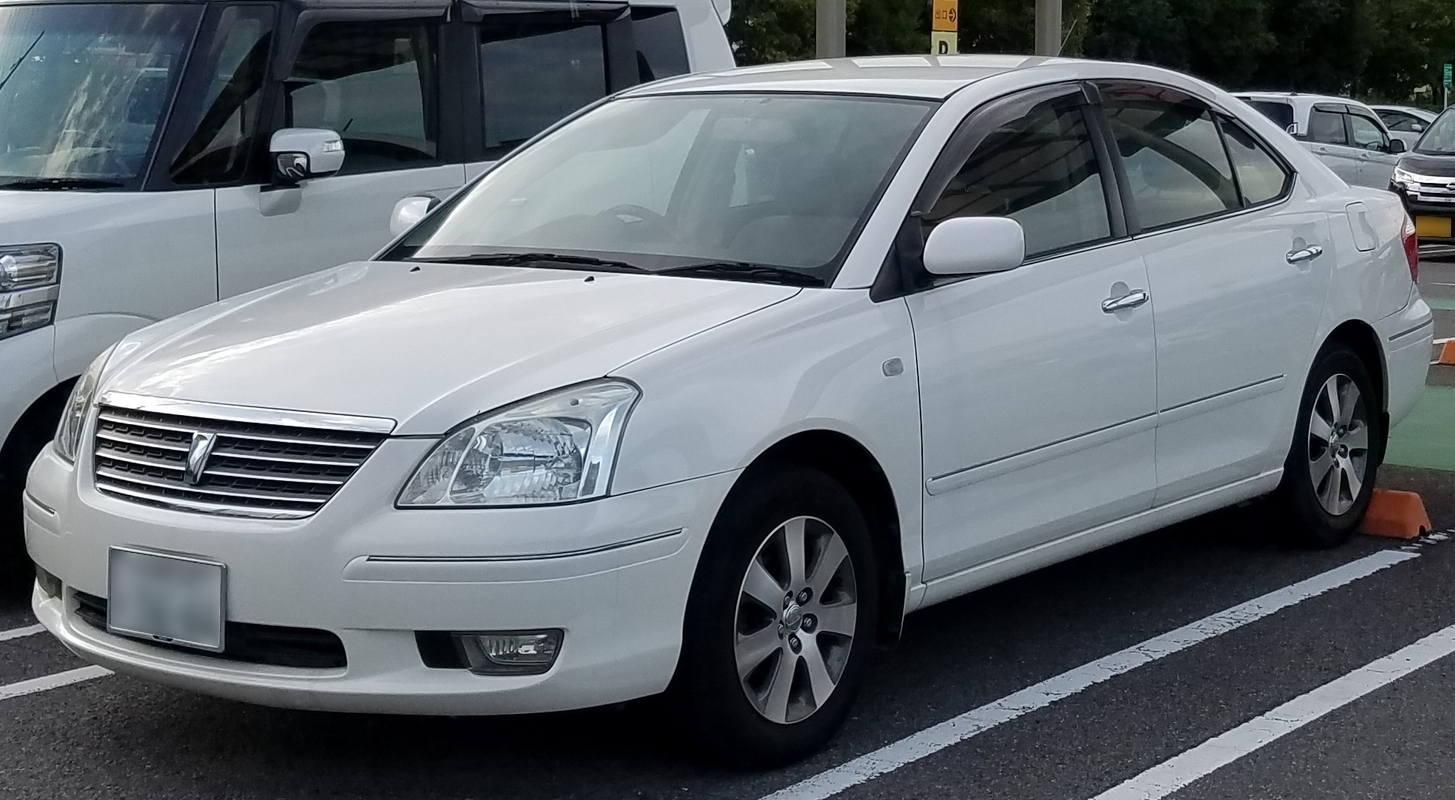 プレミオ X Lパッケージ(前期型)